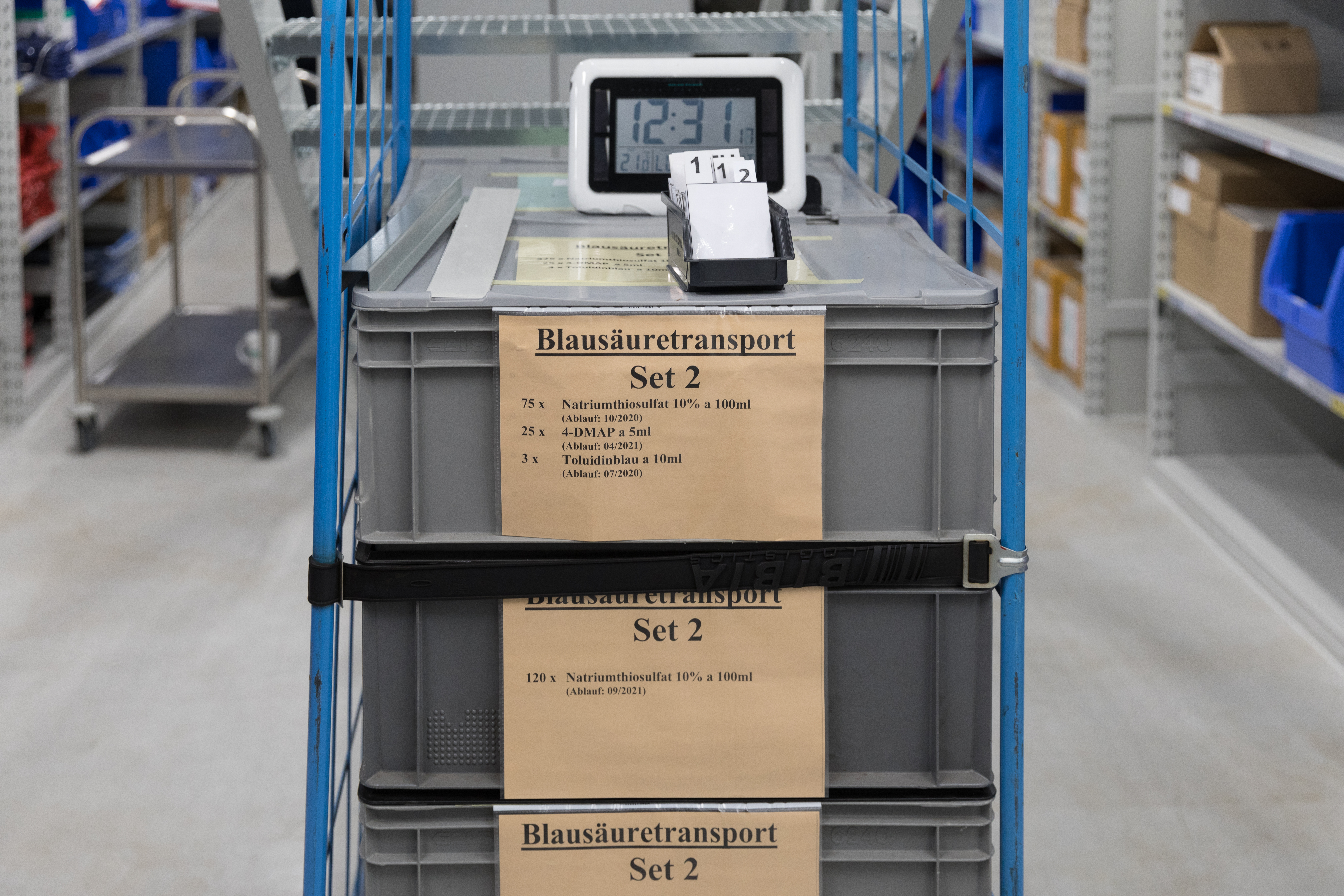 Feuerwehrzentrum Kalk - Sanitätsmittellager. Boxen mit der Aufschrift „Blausäuretransport Set“ Enthalten sind: Natriumthiosulfat 10% 4-DMAP à 5 ml Toluidinblau à 10 ml